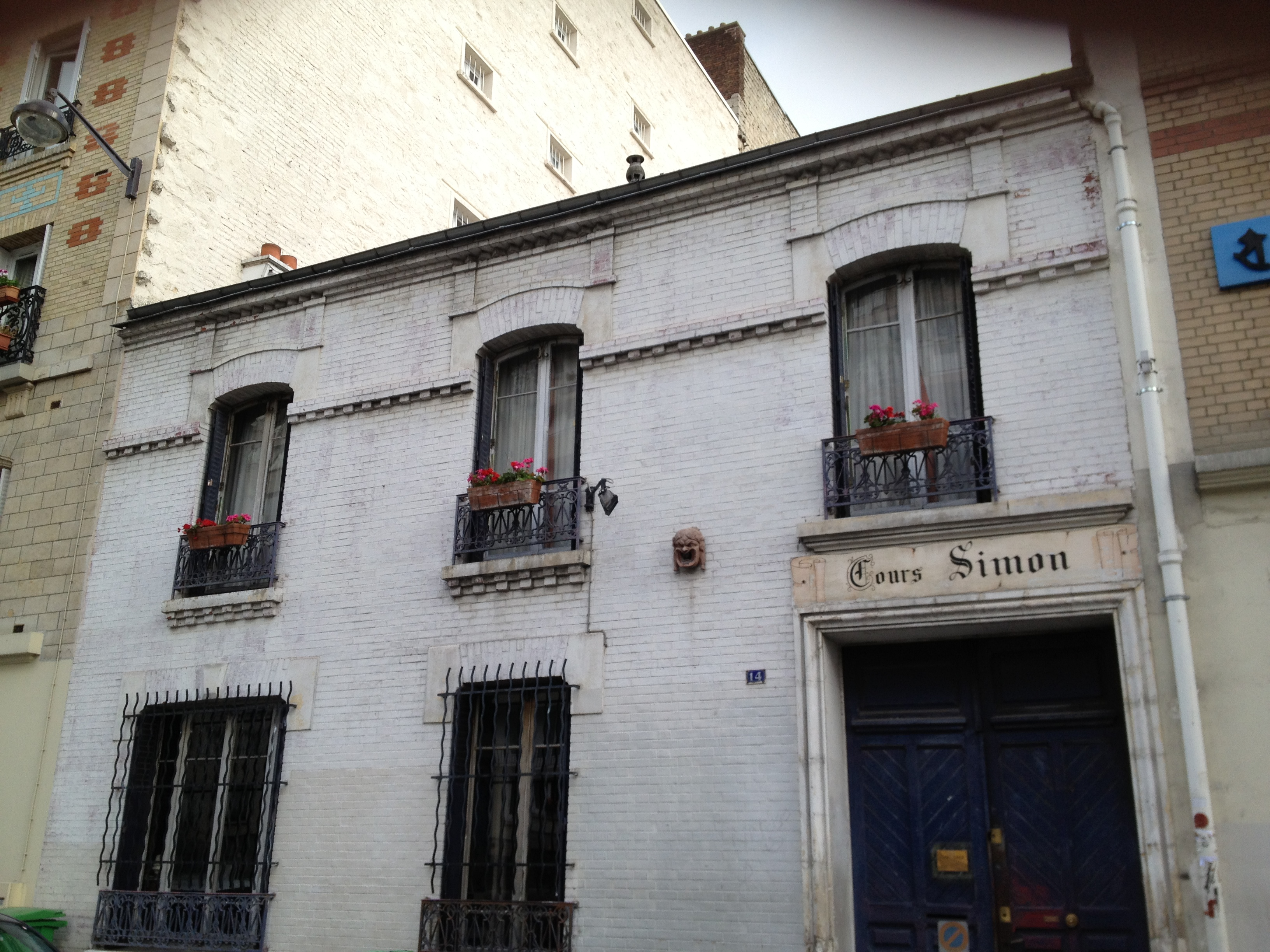 Le Cours Simon, cours d'art dramatique fondé en 1925 par René Simon, et situé au 14 Rue La Vacquerie, à Paris (France).